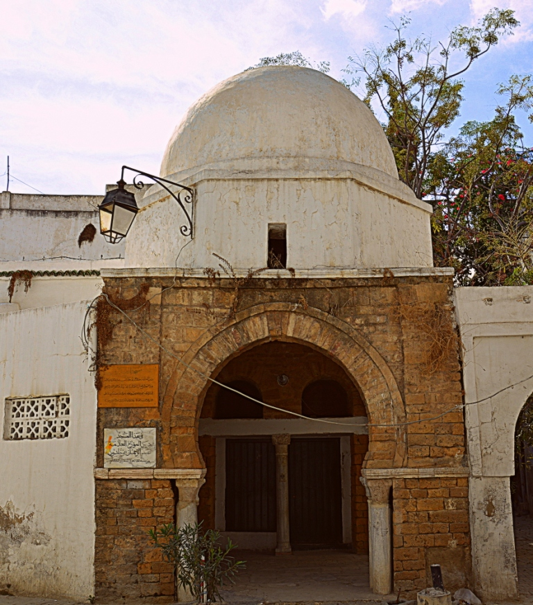 Mesjed el Kobba, Tunis